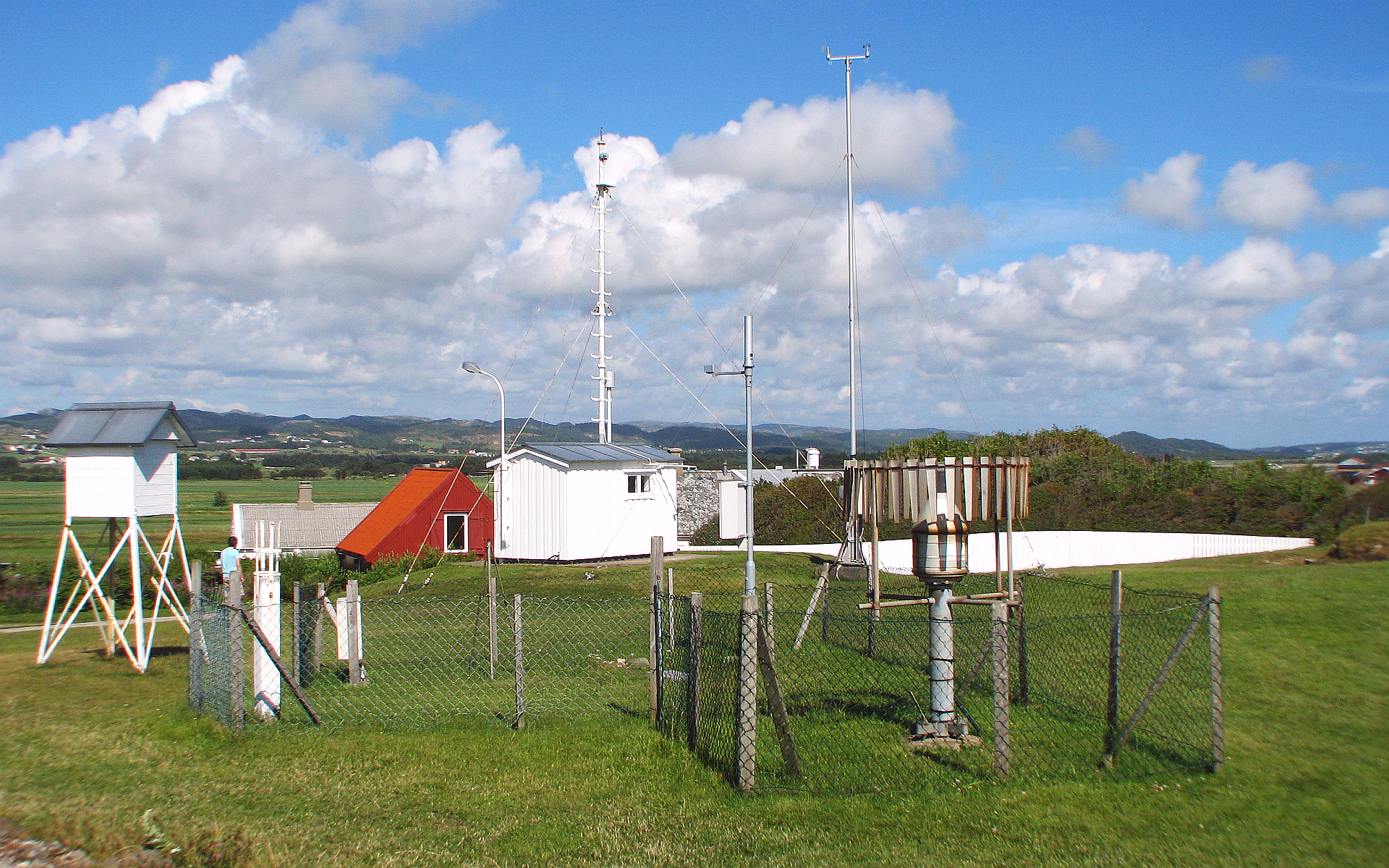 Wetterstation westlich vom Farsund lufthavn auf dem Gelände vom Leuchtturm Lista Fyr Norwegen Foto Wolfgang Pehlemann IMG_1236.jpg